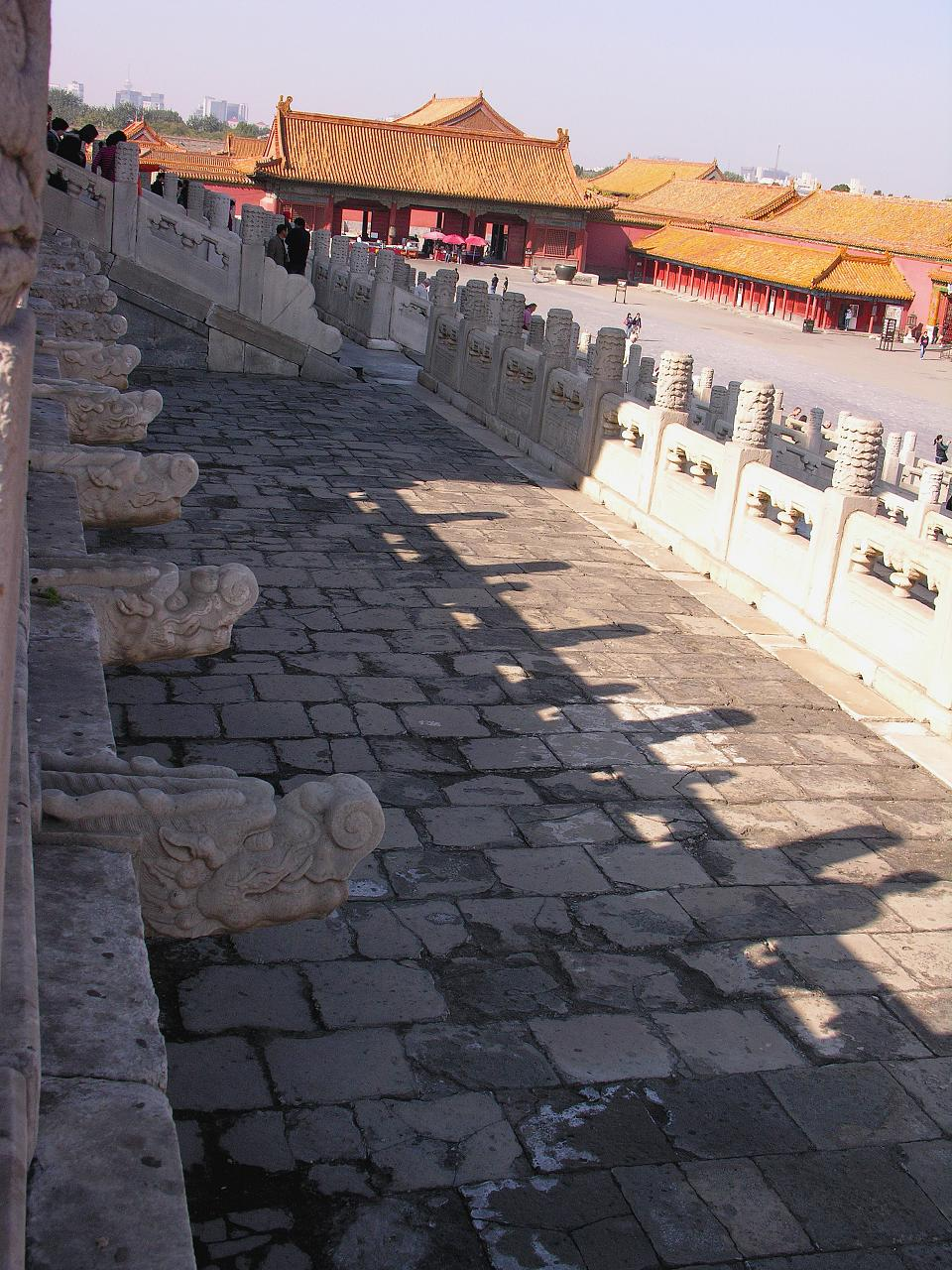 China-6214